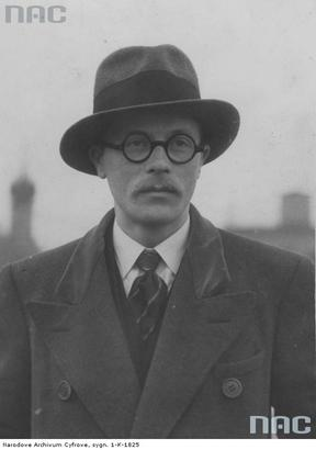 Wojciech Skuza (1908-1942) – polski poeta, pisarz, publicysta.